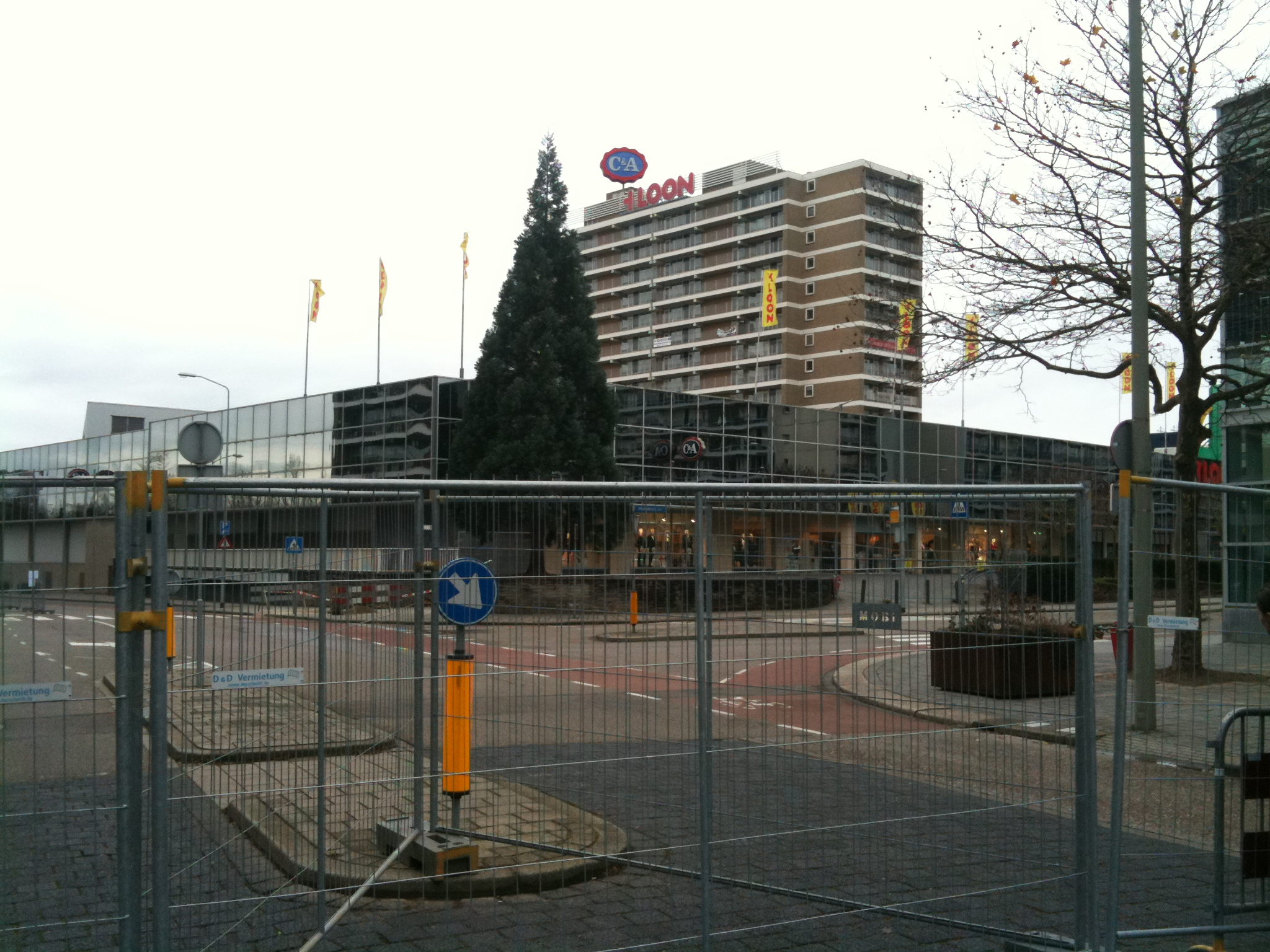 Einkaufszentrum 't Loon in Heerlen, abgesperrt wegen Einsturzgefahr.